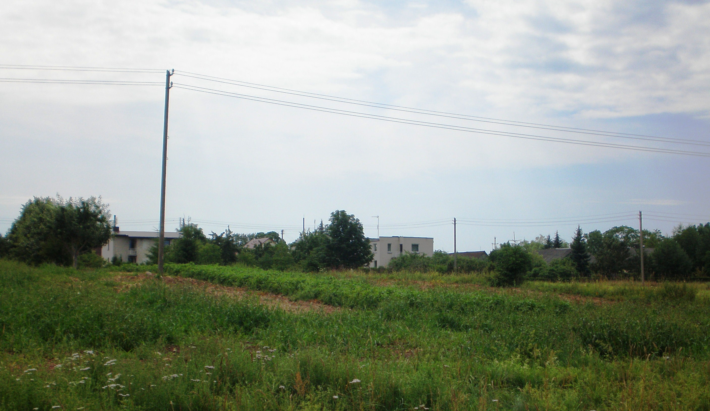 Naujarodžiai, Panevėžio raj.